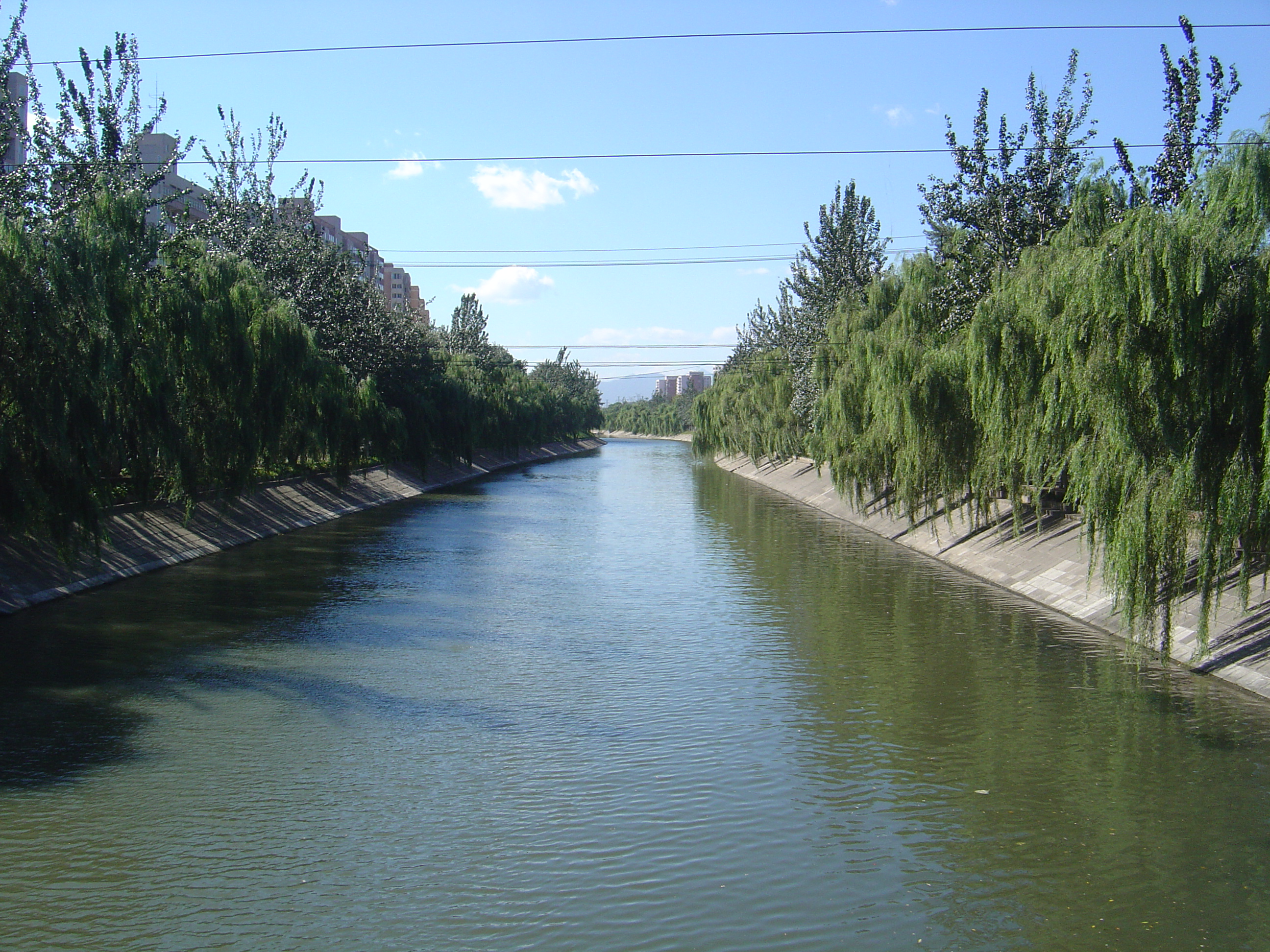 Beijing Canal